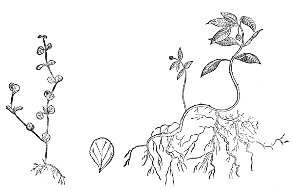 Ilustração da Ipeca (ou ipecacuanha) na obra de Guilherme Piso "De India utriusque re naturali et medica", de 1658, tida por segunda edição da Historia Naturalis Brasiliae